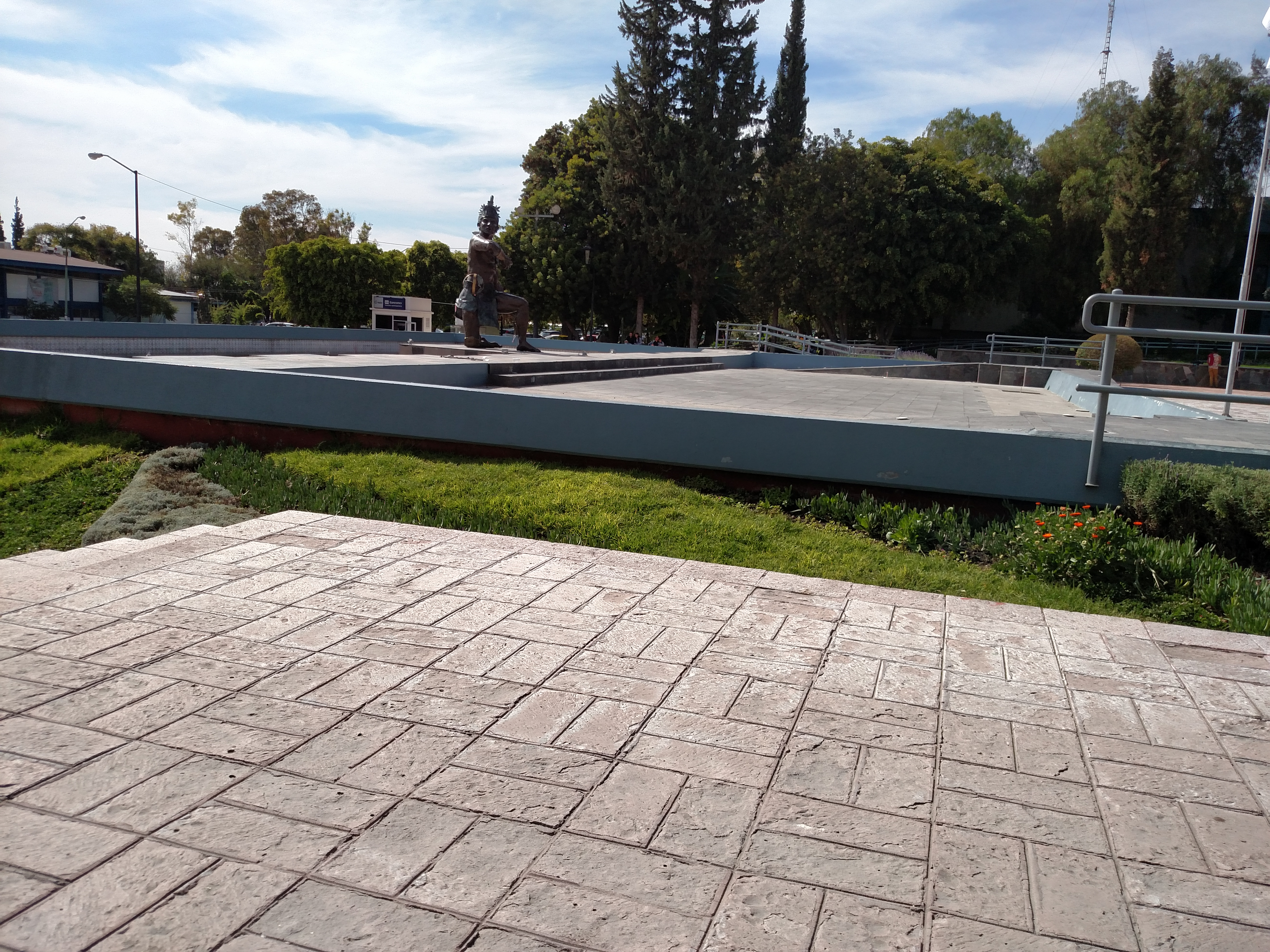 Explanada de rectoria, vista lateral, UAQ 2016.